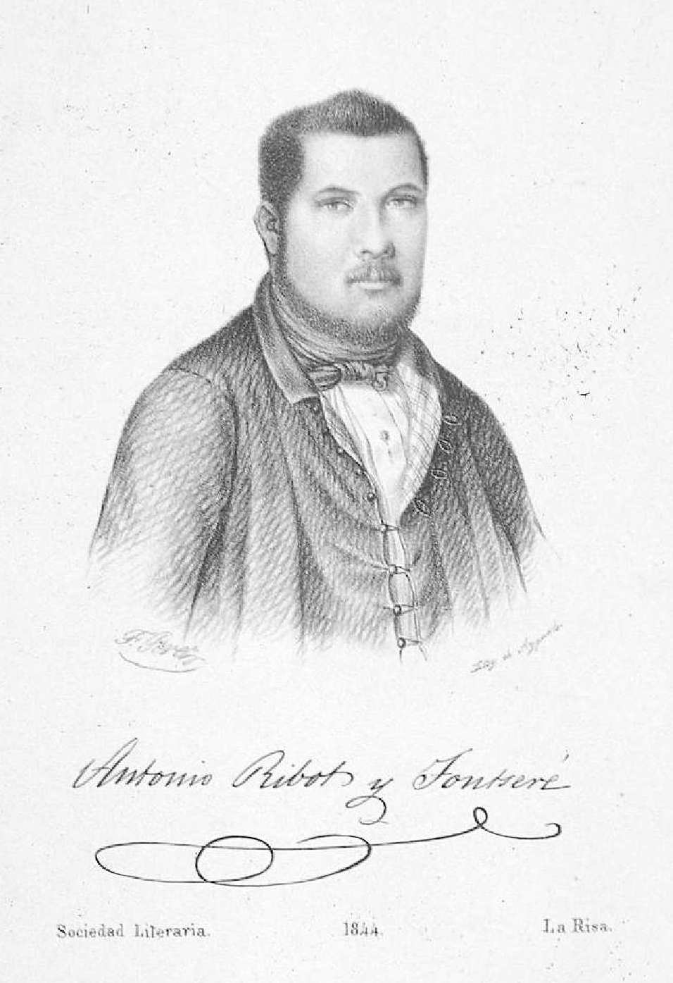 Antonio Ribot y Fontseré, litografía de Francisco Pérez, Sociedad Literaria, La Risal, 1844. Biblioteca Nacional de España